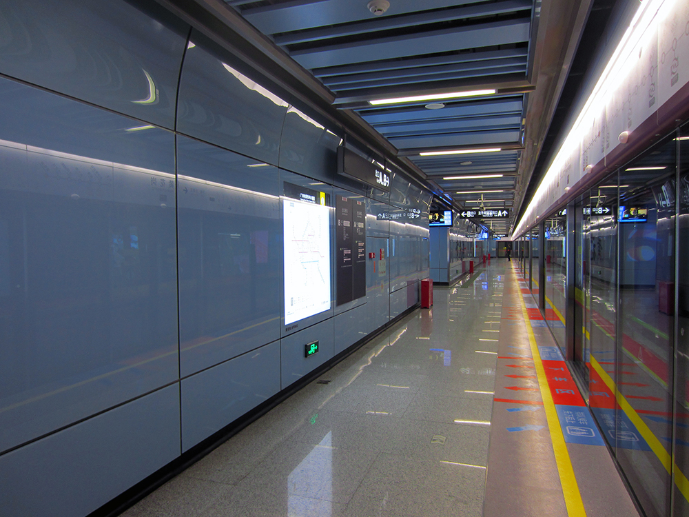 黃花崗站月台